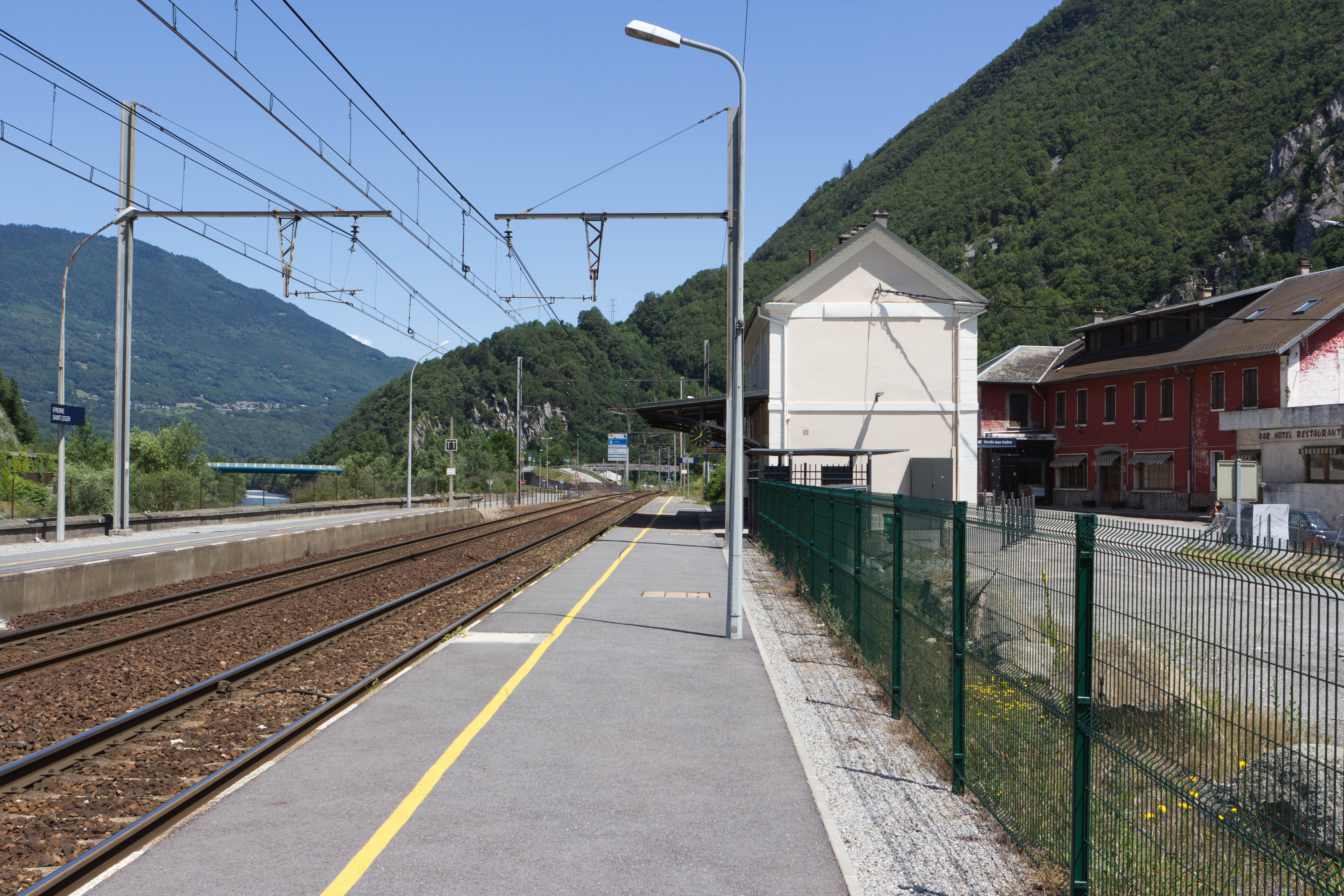 Gare d'Épierre-Saint-Léger, commune d'Épierre, département de la Savoie, France